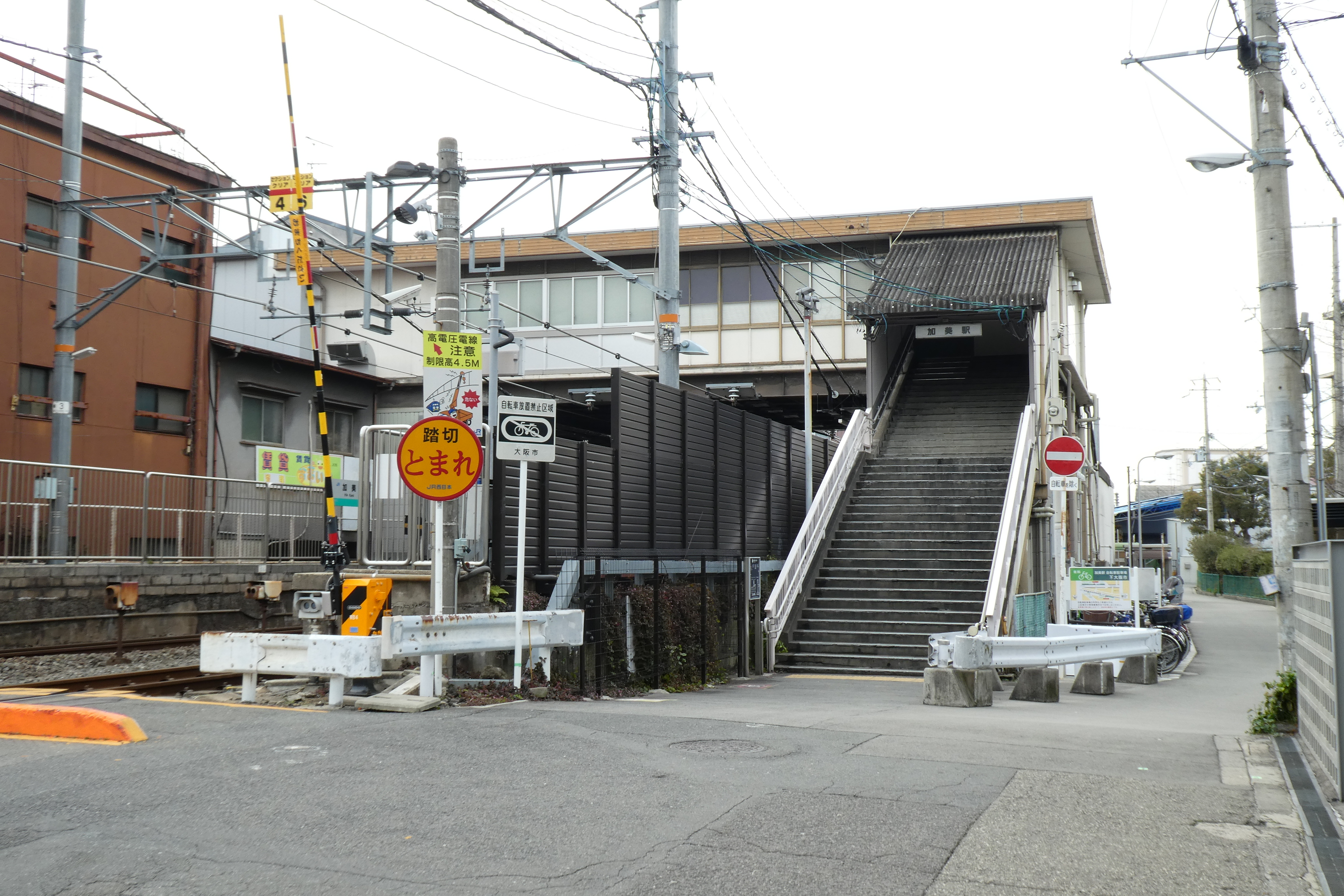 関西本線（大和路線）加美駅北口